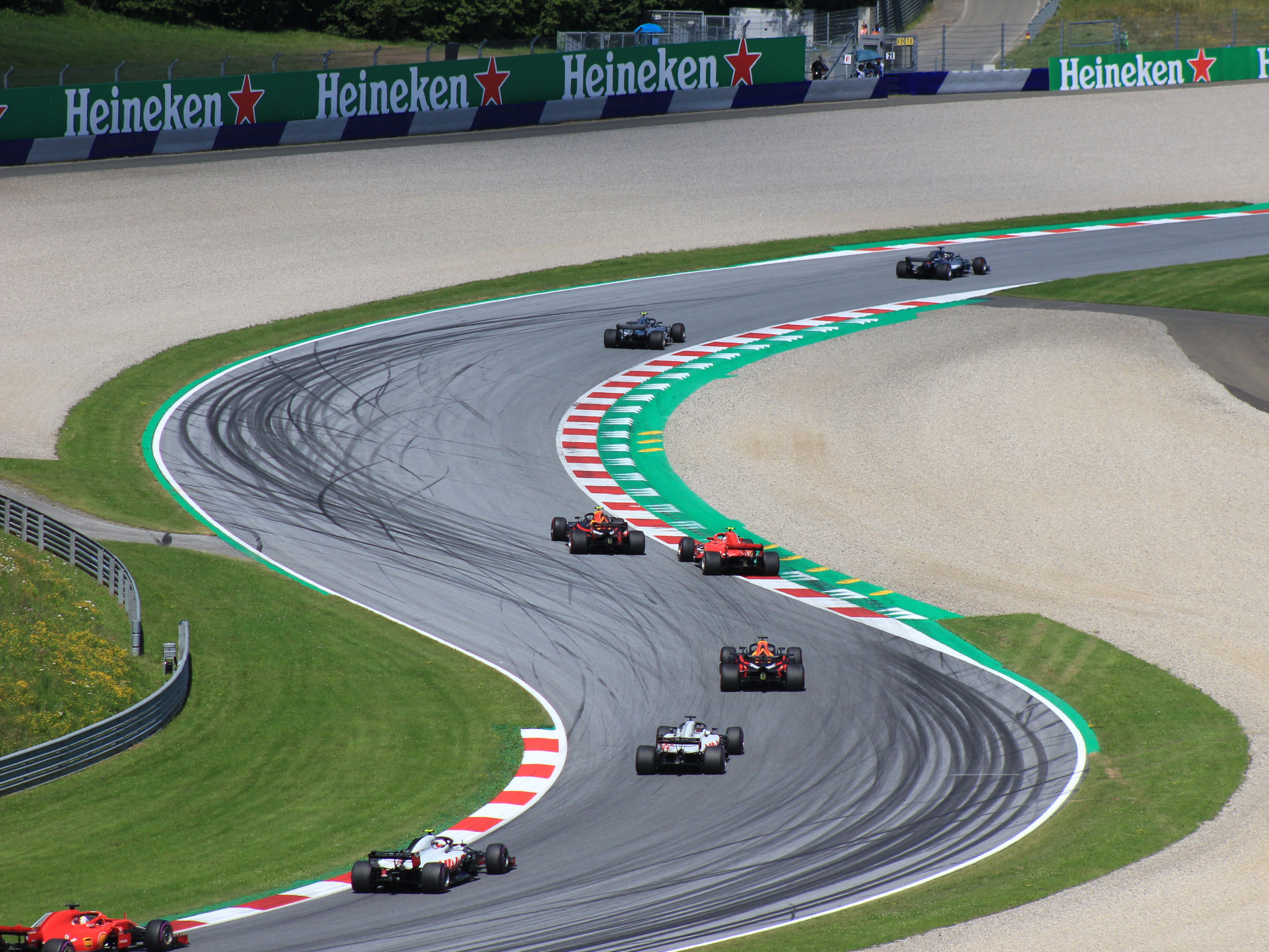 Szenen vom Rennen (Erste Runde)